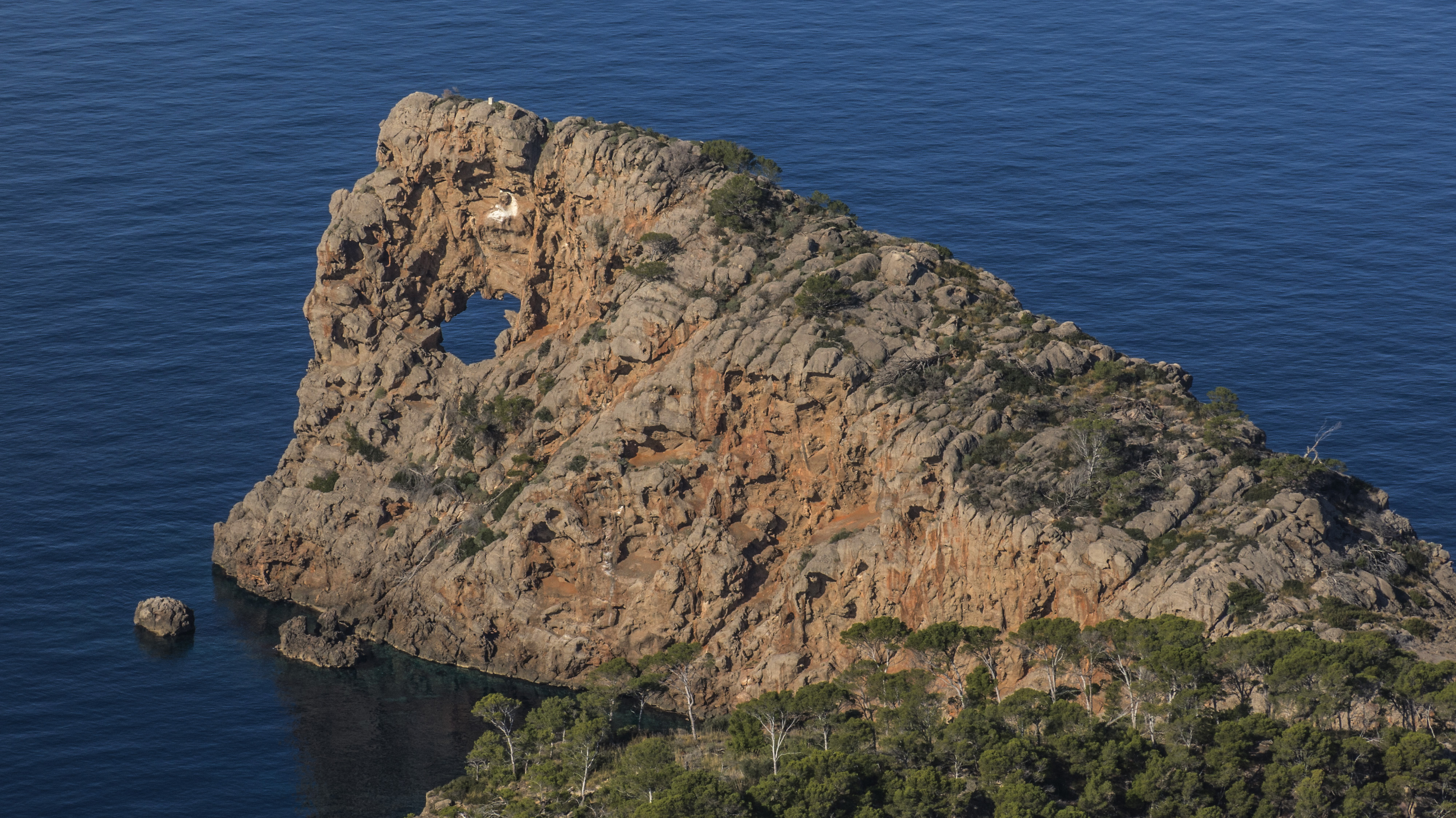 Península de la Serra de Tramuntana de Mallorca.